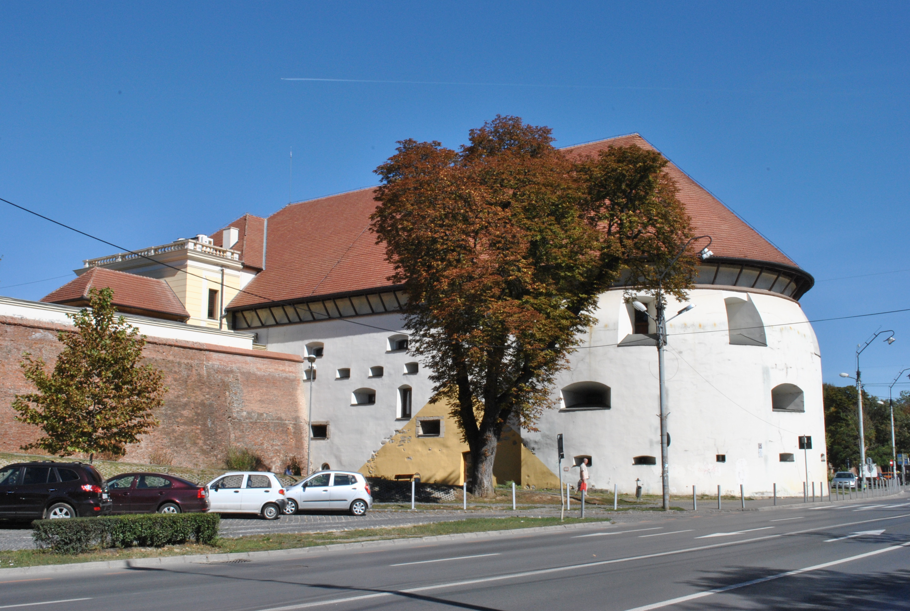 Incinta III: Turnuri de apărare, Turnul Dulgherilor, Turnul Olarilor, Turnul Archebuzierilor, Turn de Poartă, curtine, 1357 - 1366 03